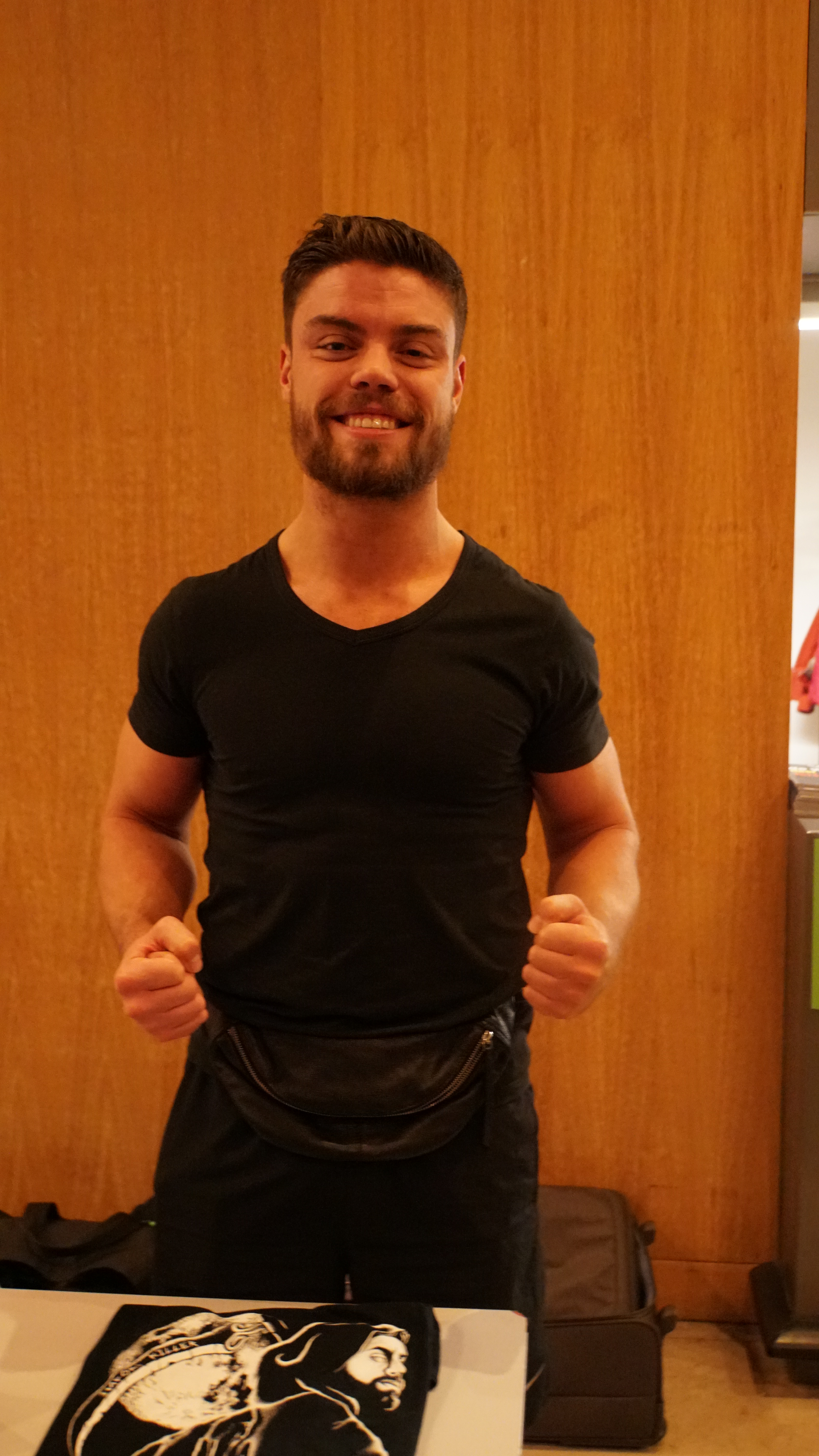 Flemish Wrestling Force - Wrestlefest 3 - Divers Photos diverses prisent avant et apres le show ( Description: Pro Wrestling keert terug naar de Werft. Op zaterdag 20 januari keert Flemish Wrestling Force terug naar de Werft met een spetterende show vol actie en spektakel. Mannen en vrouwen van over heel Europa reizen af naar Geel om het beste worstelen, dat ooit in Belgie gezien is, te tonen. De blikvangers van Wrestlefest 3 zijn ongetwijfeld Doug Williams (UK) en Jordan Devlin (IR) . De Britse spierbundel Doug Williams behoort tot de absolute wereldtop. Hij is een voormalige TNA en ROH ster. Binnen TNA is hij een voormalig TNA X-Division Champion en TNA Tag Team Champion. Binnnen ROH droeg hij de ROH Pure Wrestling kampioenenriem. Jordan Devlin is een WWE ster uit Ierland die al op zijn twaalfde voor het eerst de ring in stapte. Hij werd opgeleid en wordt ondersteund door Finn Balor. Net zoals vele Ierse wrestlers hanteert hij een directe en fysiek intense wijze van worstelen. Ook de Fransman Lucas Di Leo was reeds actief binnen WWE NXT. Verder ontbreken de huidige FWF World Champion Phil Boyd (IR), FWF Queen of Extreme Katey Harvey (IR), FWF Tag Team Champions The Heroes Of Tomorrow en FWF Flemish Champion Gridlock niet. Tel daarbij nog de aanwezigheid van lokale helden en publiekslievelingen Rob Raw, Homeless Tom en Jungle Jill en je weet dat deze derde editie van Wrestlefest er eentje wordt om duimen en vingers bij af te likken! )